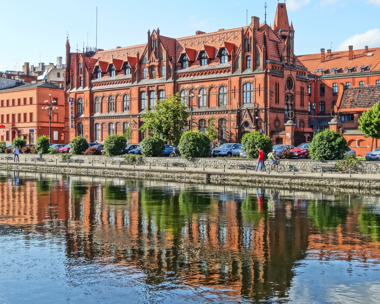 Budynek Poczty Głównej w Bydgoszczy przy ul. Jagiellońskiej (zbud. 1883 skrzydło płd, 1899 skrzydło płn)